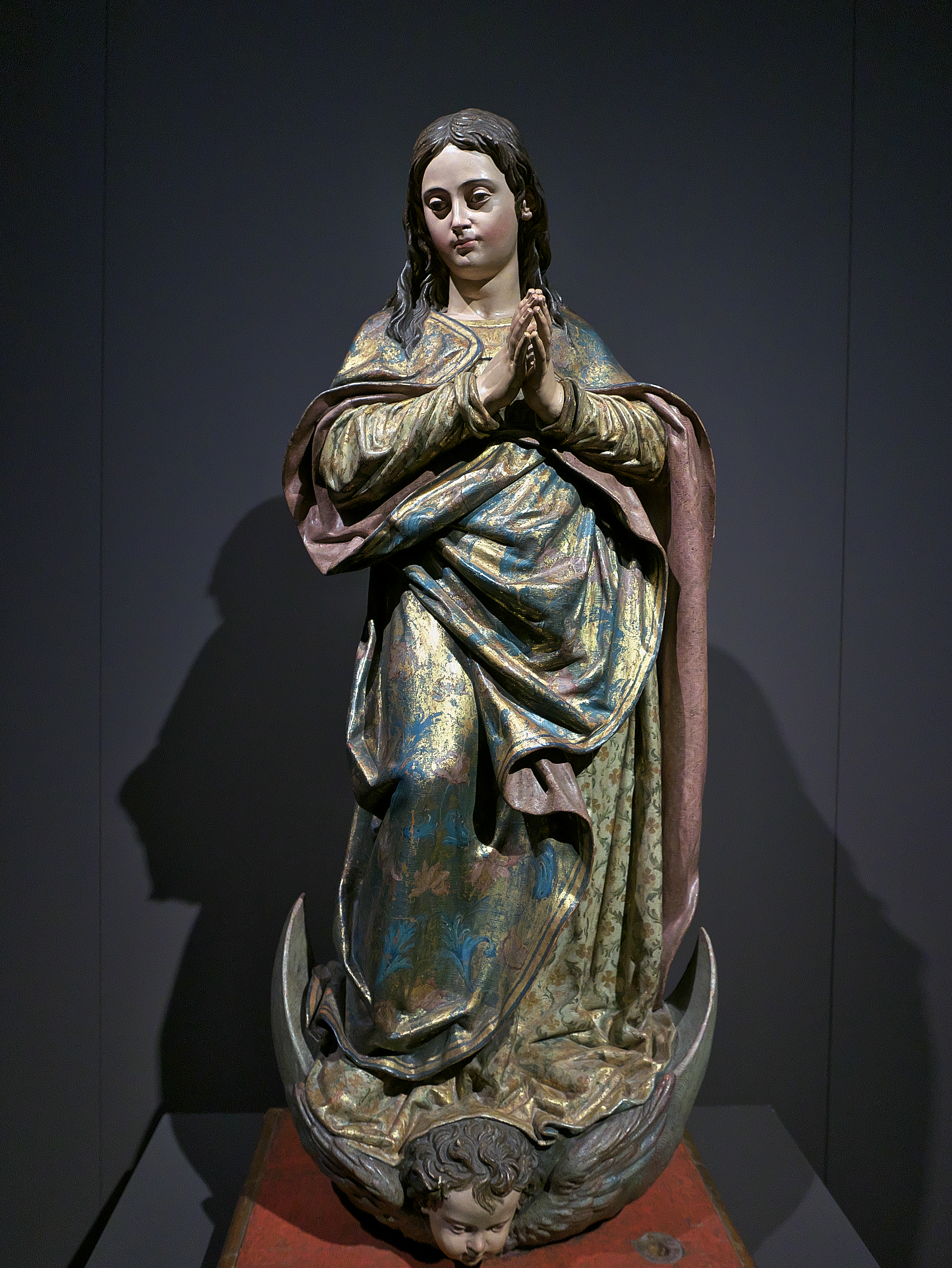 Juan Martínez Montañés crea (1606-1608) su insuperable modelo iconográfico de la Concepción Inmaculada de María, transmitiendo la candidez, la dulzura, la ingenuidad ... con recursos propios de los genios del arte.